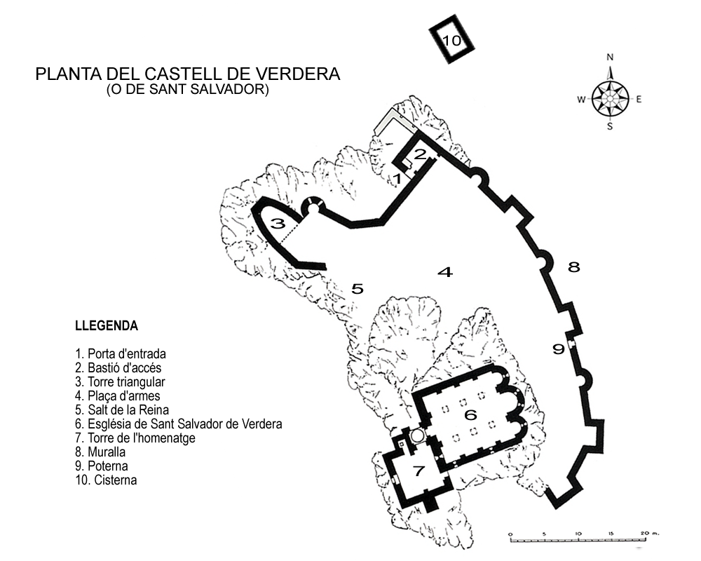 Planta del castell de Verdera(Alt Empordà) / Plan of the Verdera castle (Alt Empordà).